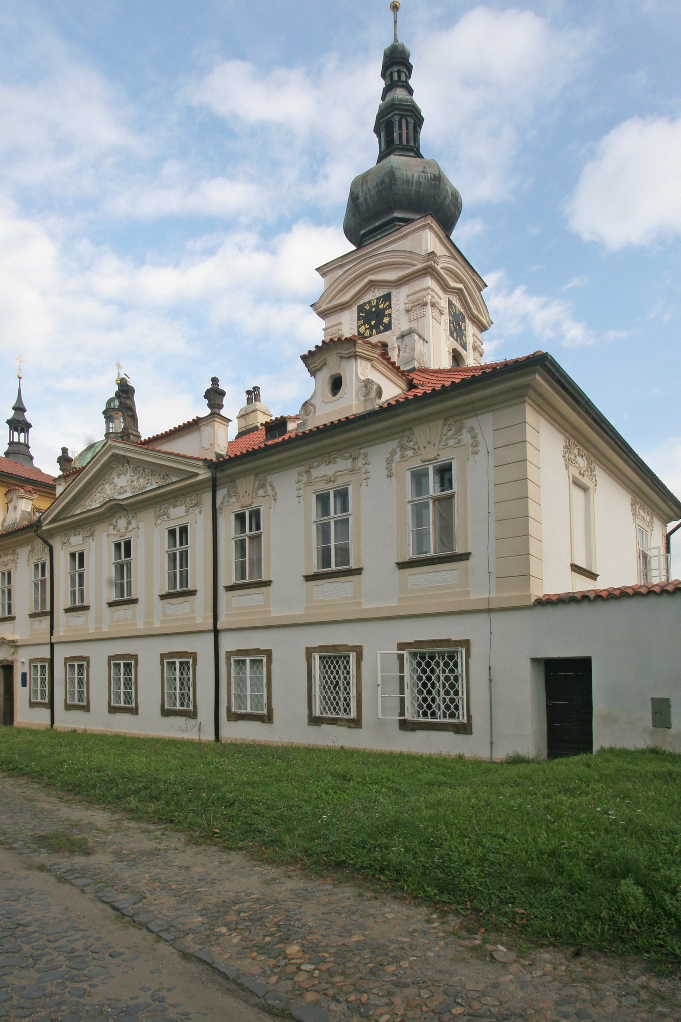 Klášter (Doksany), Doksany 1, kostel Narození Panny Marie